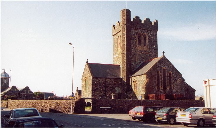 cc-by-3.0